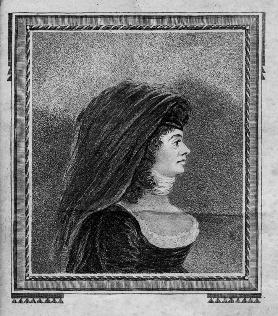 Gräfin von Lichtenau, Porträt-Frontispiz aus der Schmähschrift: August Wilhelm Baranius (Pseudonym, eventuell für Johanna Isabella Eleonore von Wallenrodt): Versuch einer Biographie der Frau Gräfin von Lichtenau einer berühmten Dame des vorigen Jahrhunderts. Zürich und Lindau (d. i. Leipzig, Wilhelm Rein), 1800.